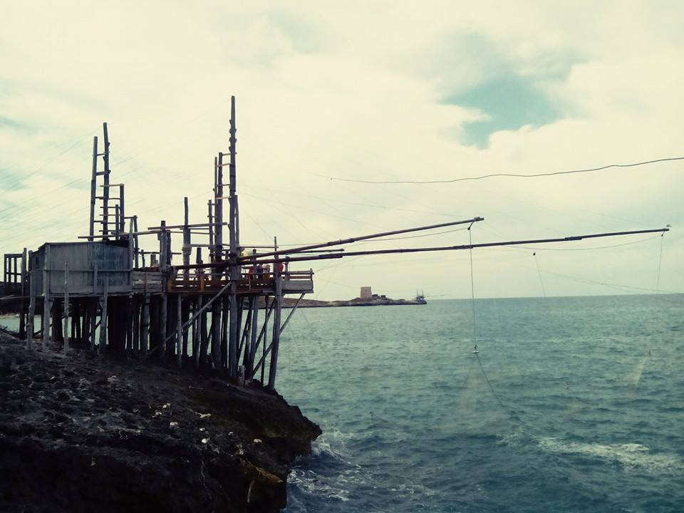 Trabucco Furcichella, presso Peschici (FG), Baia di Manacore, nel cuore del Gargano, Puglia.